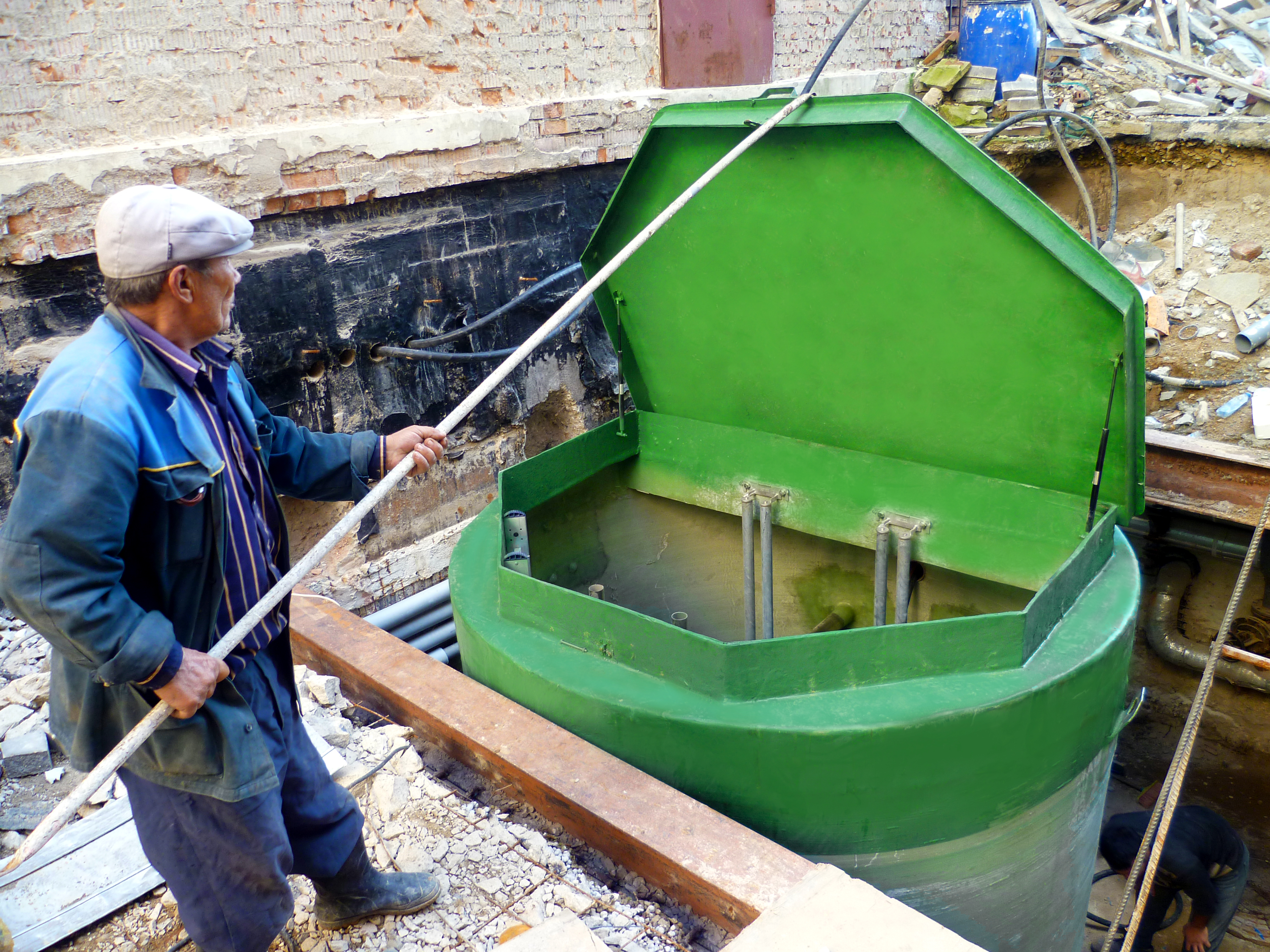 Пуско-наладка канализационной насосной станции